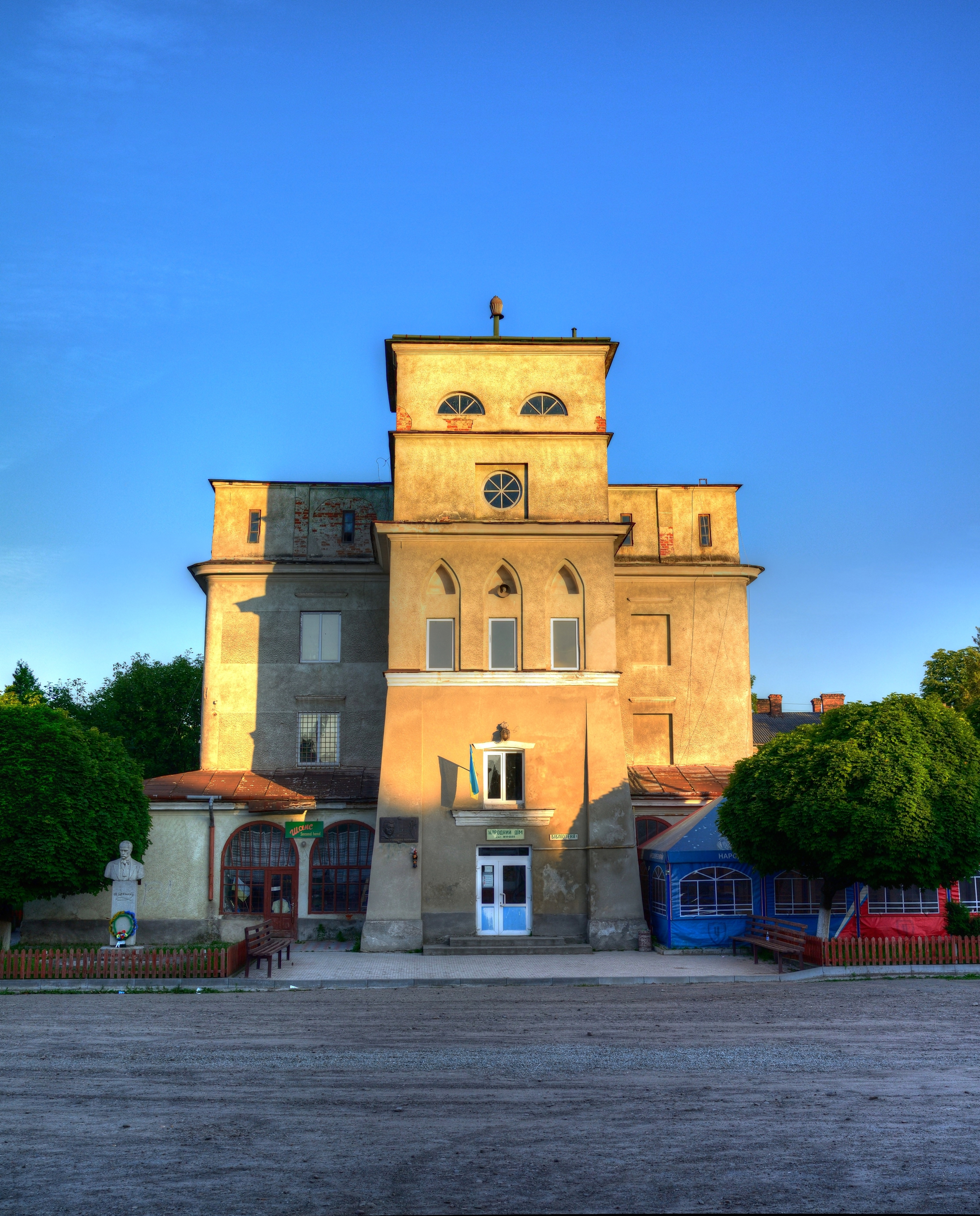 Будівля журавнівської ратуші